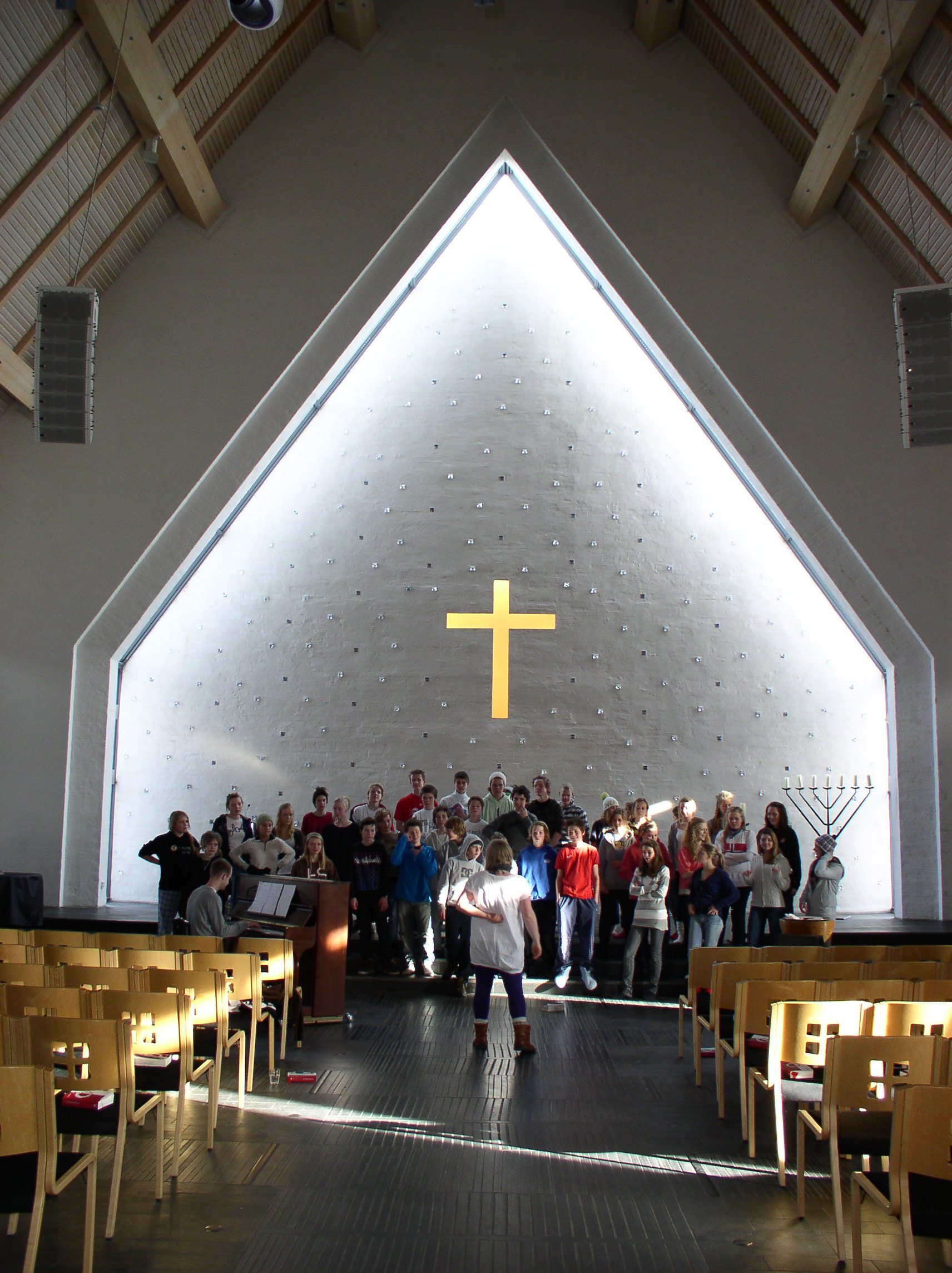 Koret øver i Lommedalen kirke februar 2008